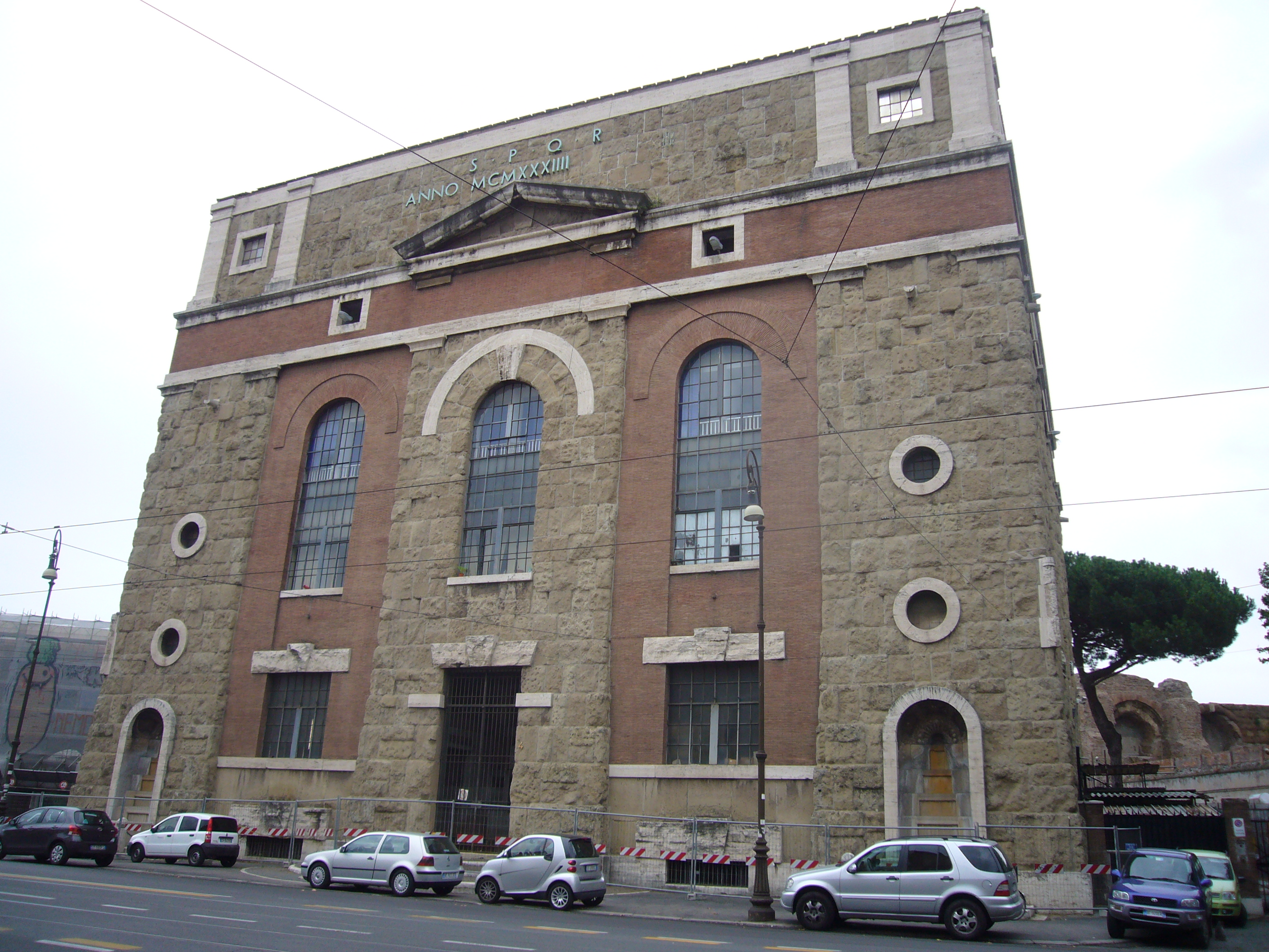 Roma, via Eleniana. Cabina idrica ACEA (Stoelker - De Vico, 1933)